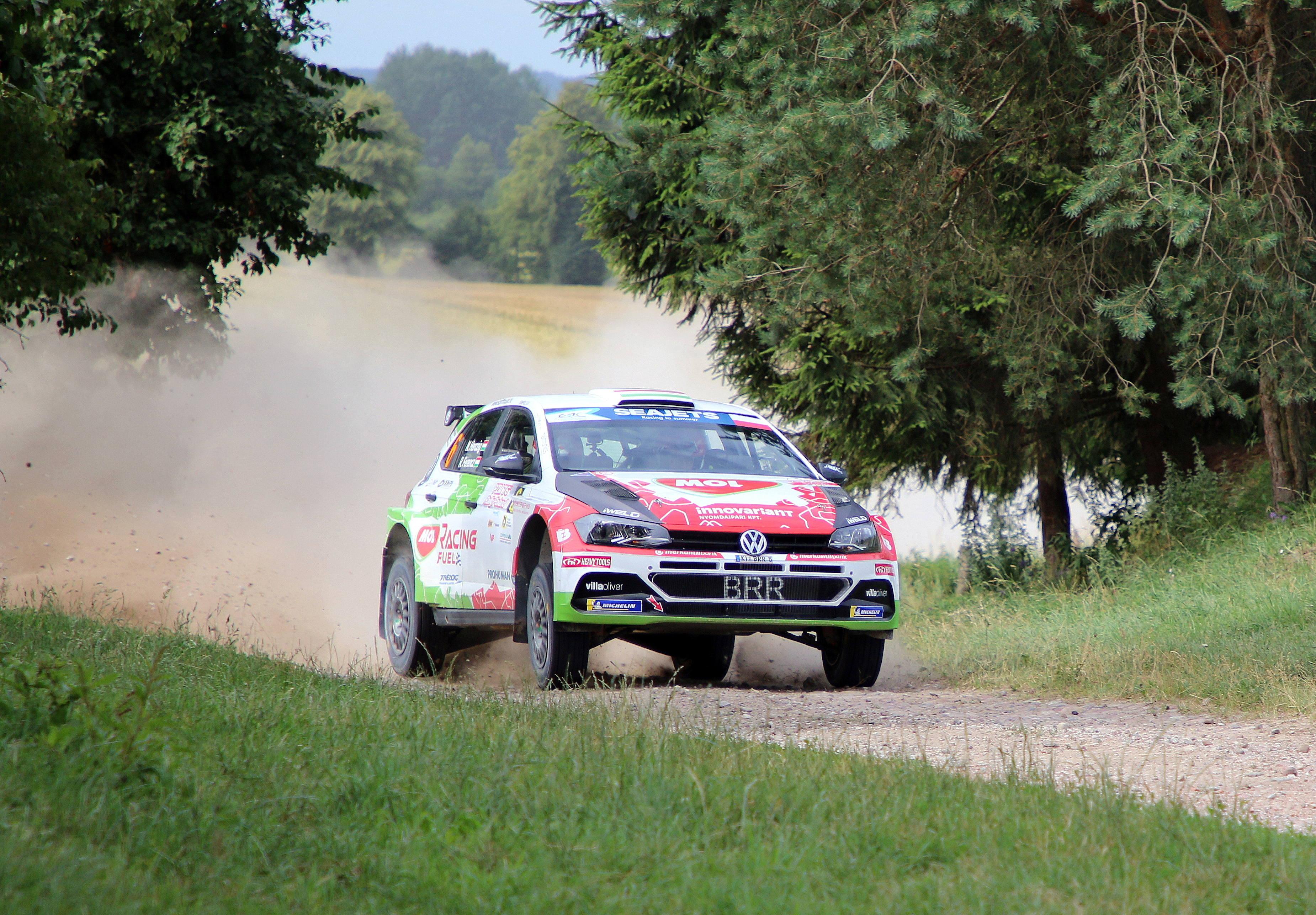 Norbert Herczig podczas Rajdu Polski 2019